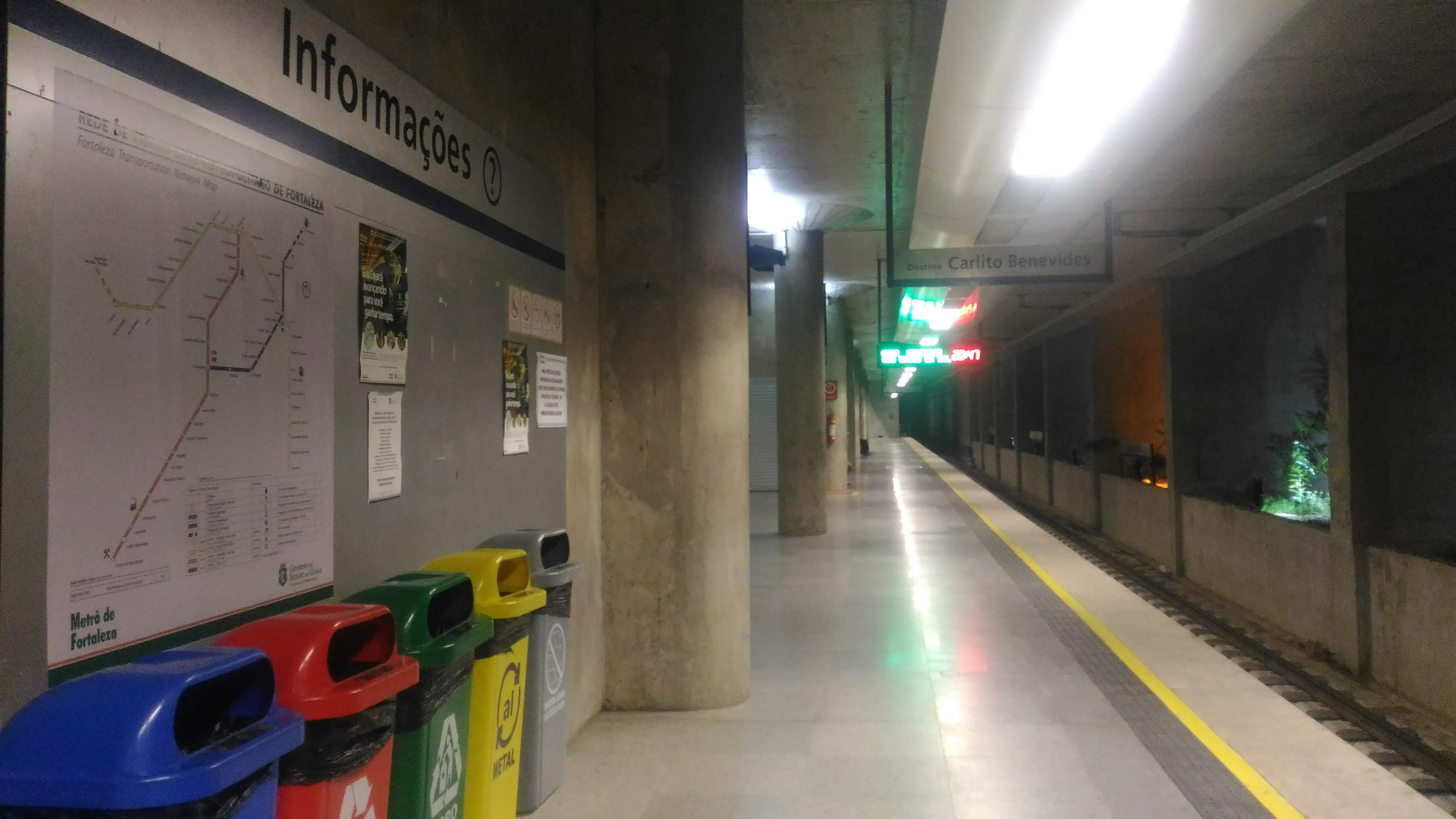 Estação Central do metrô de Fortaleza, Chico da Silva.